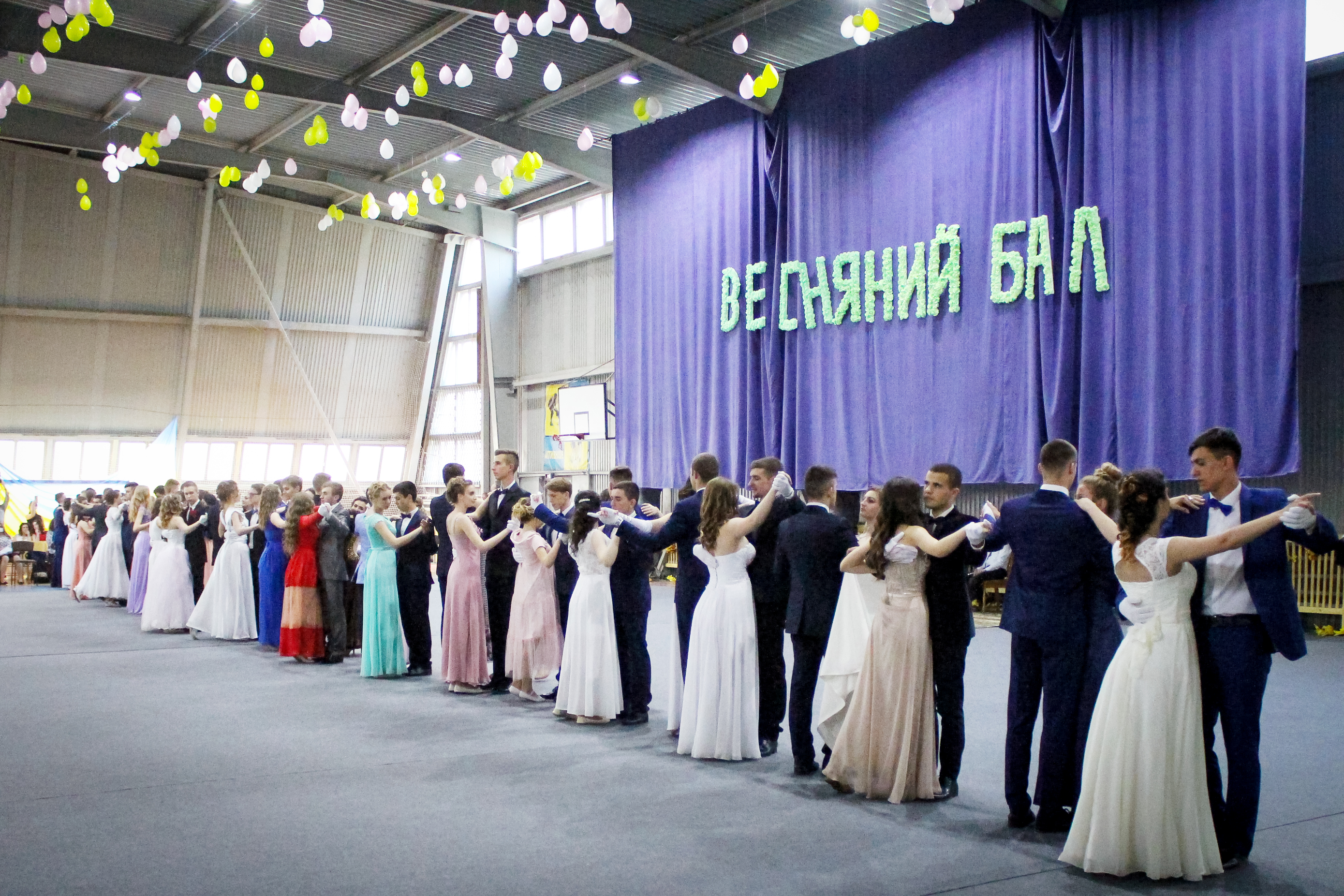 Студентський весняний бал у ХКТЕІ - травень 2017 року